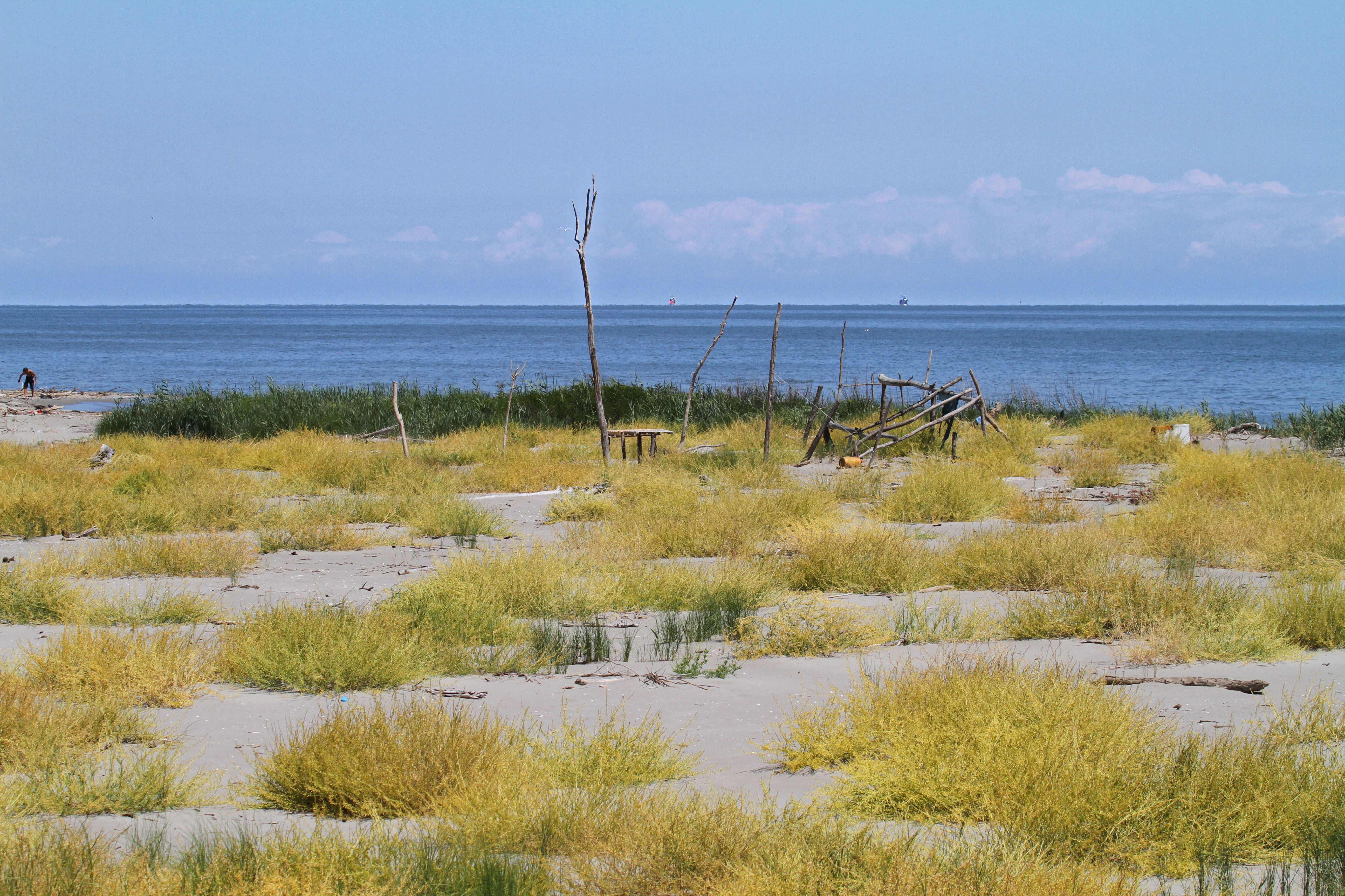 Lagune tra Po di Goro e Po di Gnocca